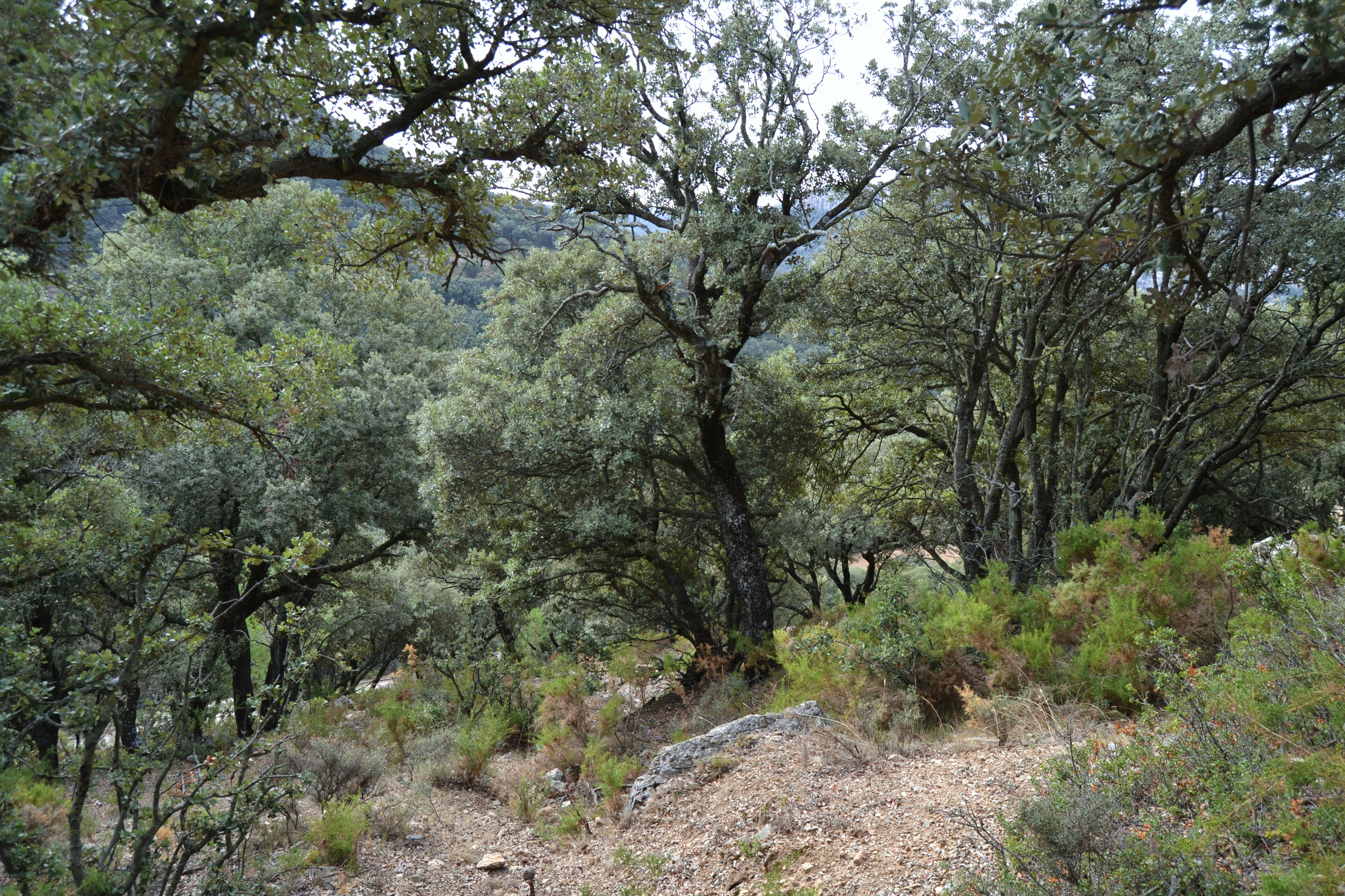 Bosc de carrasques de camí cap a la Mola Remígia.